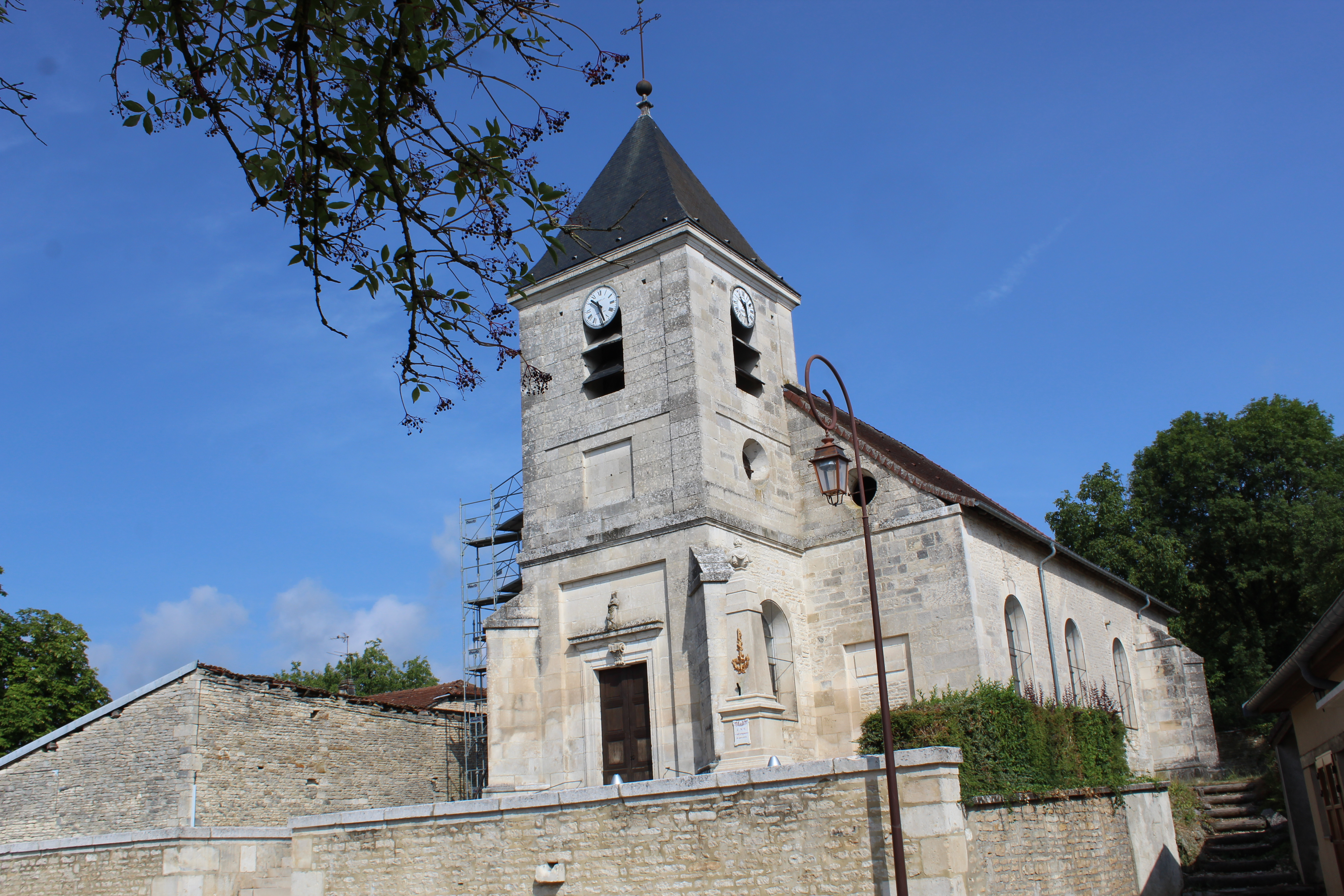 Eglise